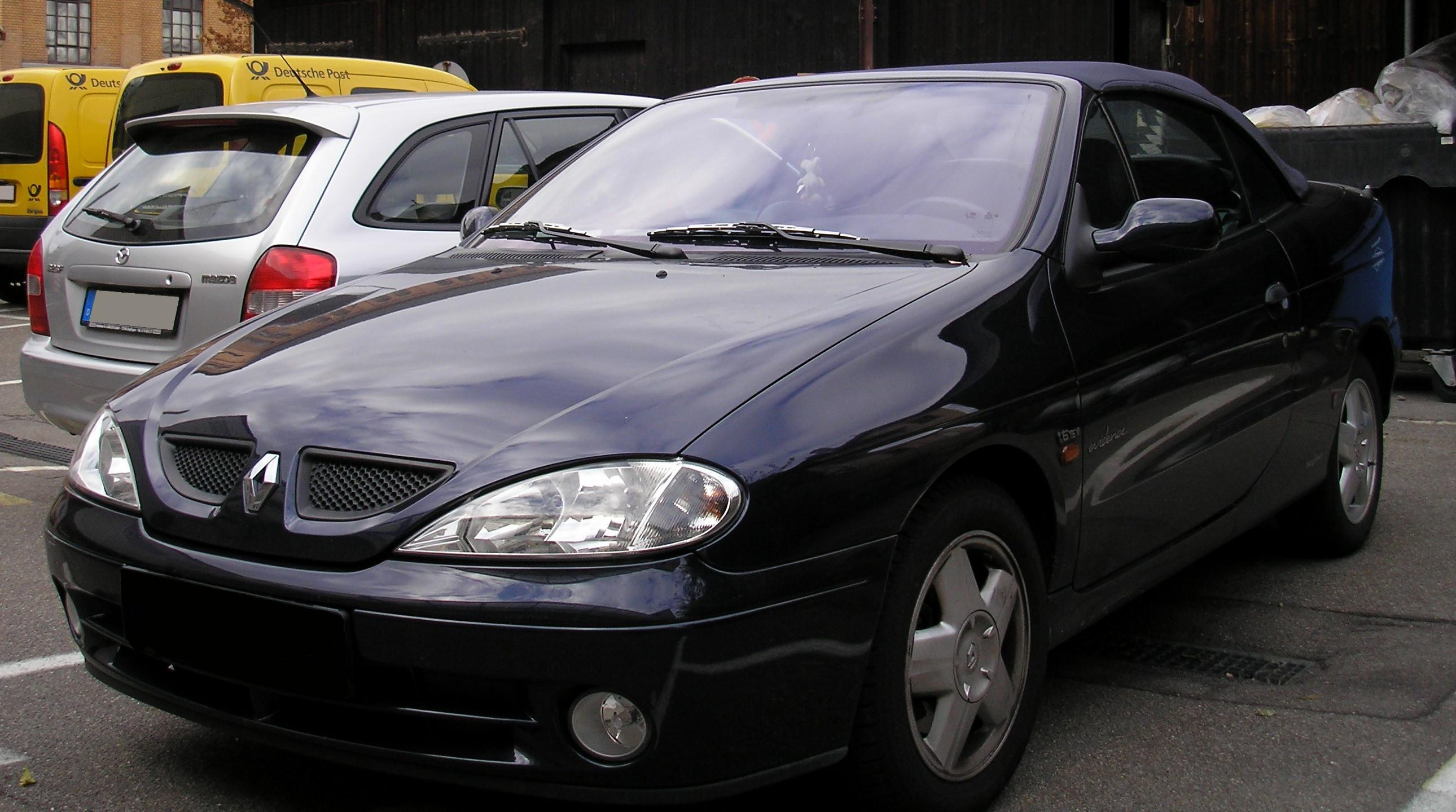 Renault Megane Cabriolet, ca. 2003